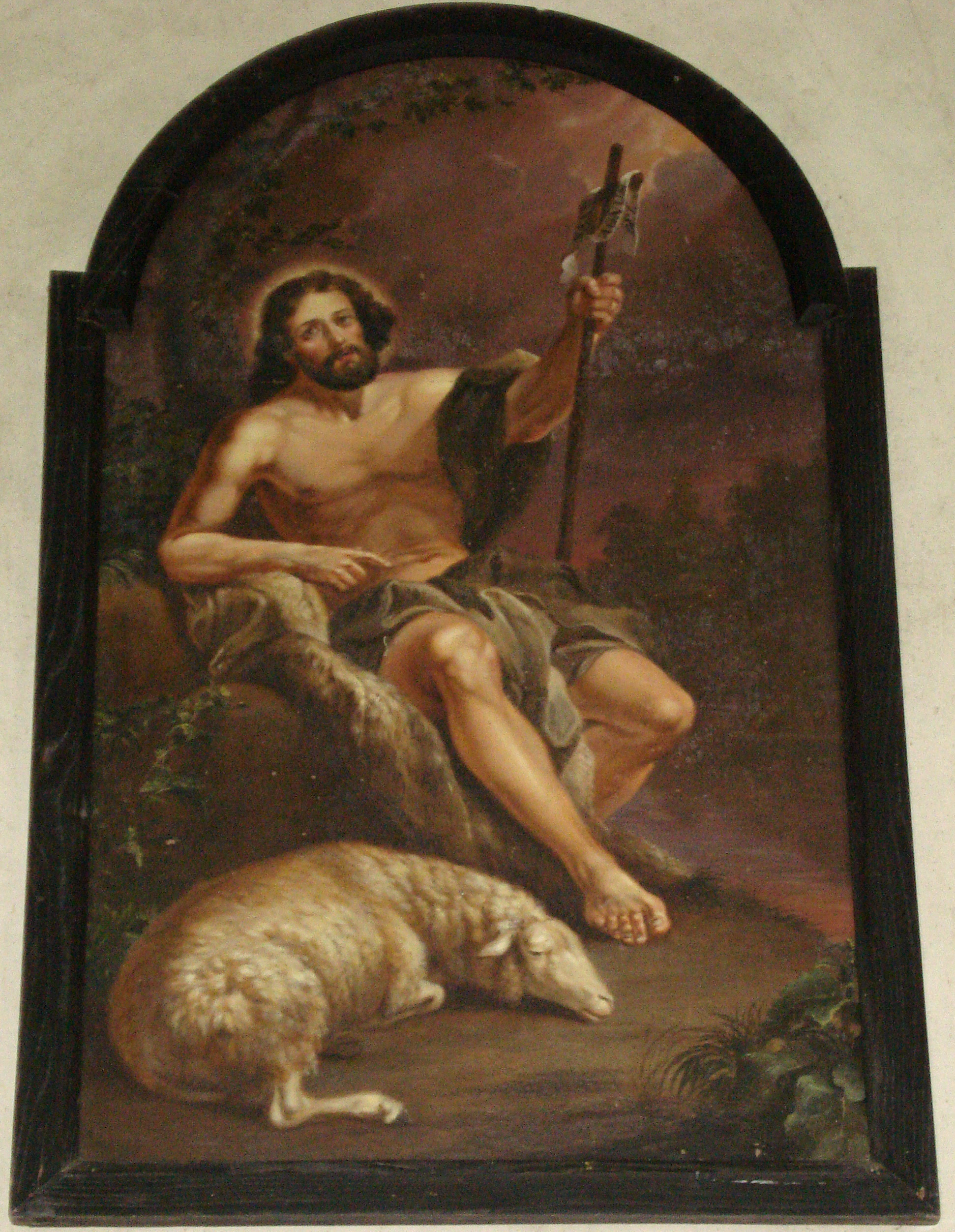 Neerlangel, St. Jean Baptiste, anonyme, dans l'église qui porte son nom